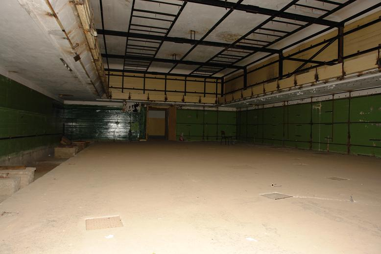 Bunker Falkenhagen, Level 3 - war room / Gefechtsführungszentrum im ersten Untergeschoss.